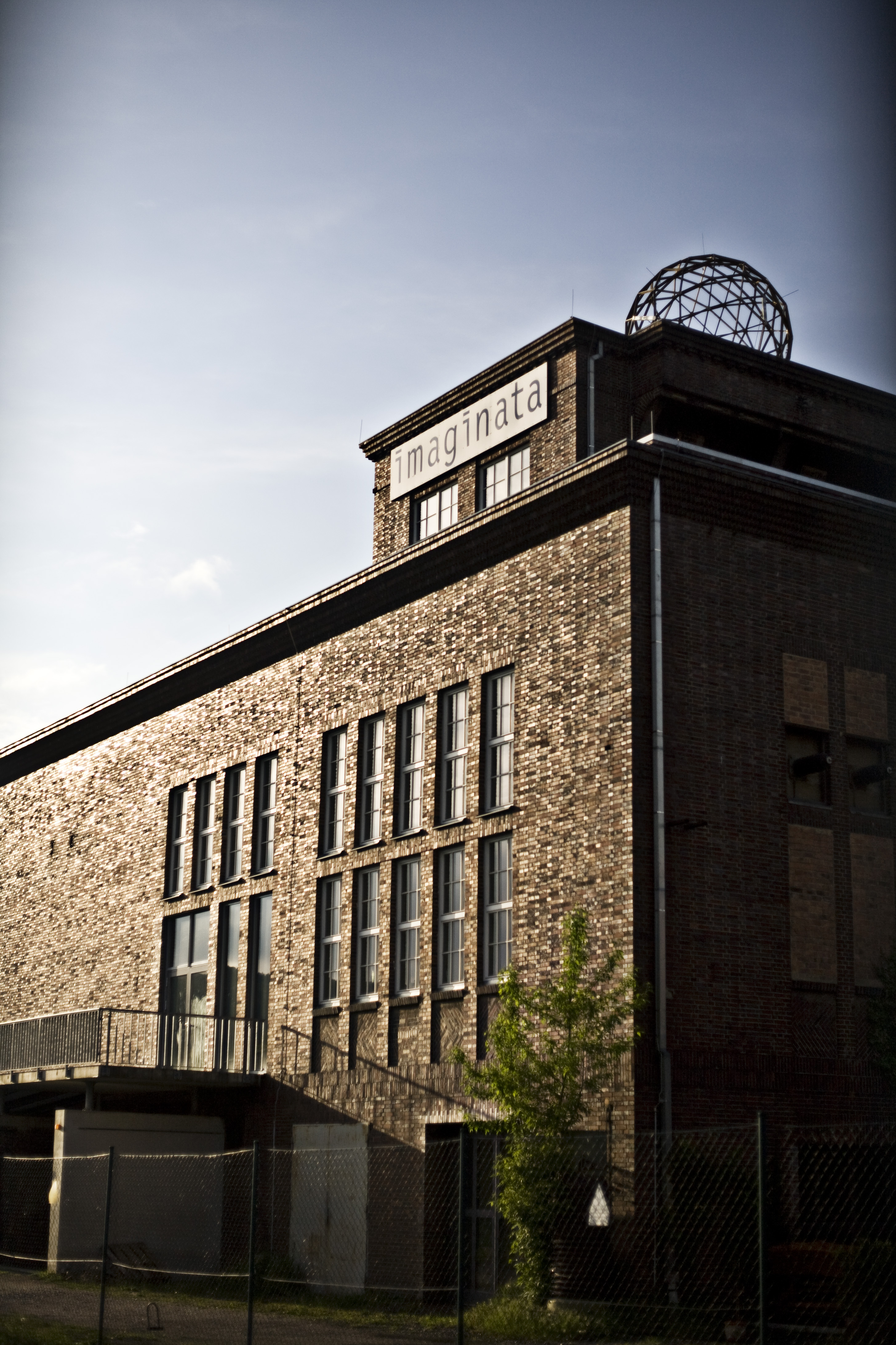 Imaginata, Umspannwerk Jena Nord mit Imaginata-Kugel